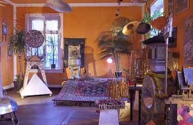 Weltenreisen-Raum im Lügenmuseum Sonstiges: Rechte im Jun. 2005 gespendet